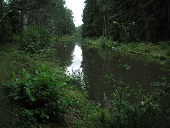 Hjälmare kanal, genom skogen mellan Hällby och Kvarnsjön